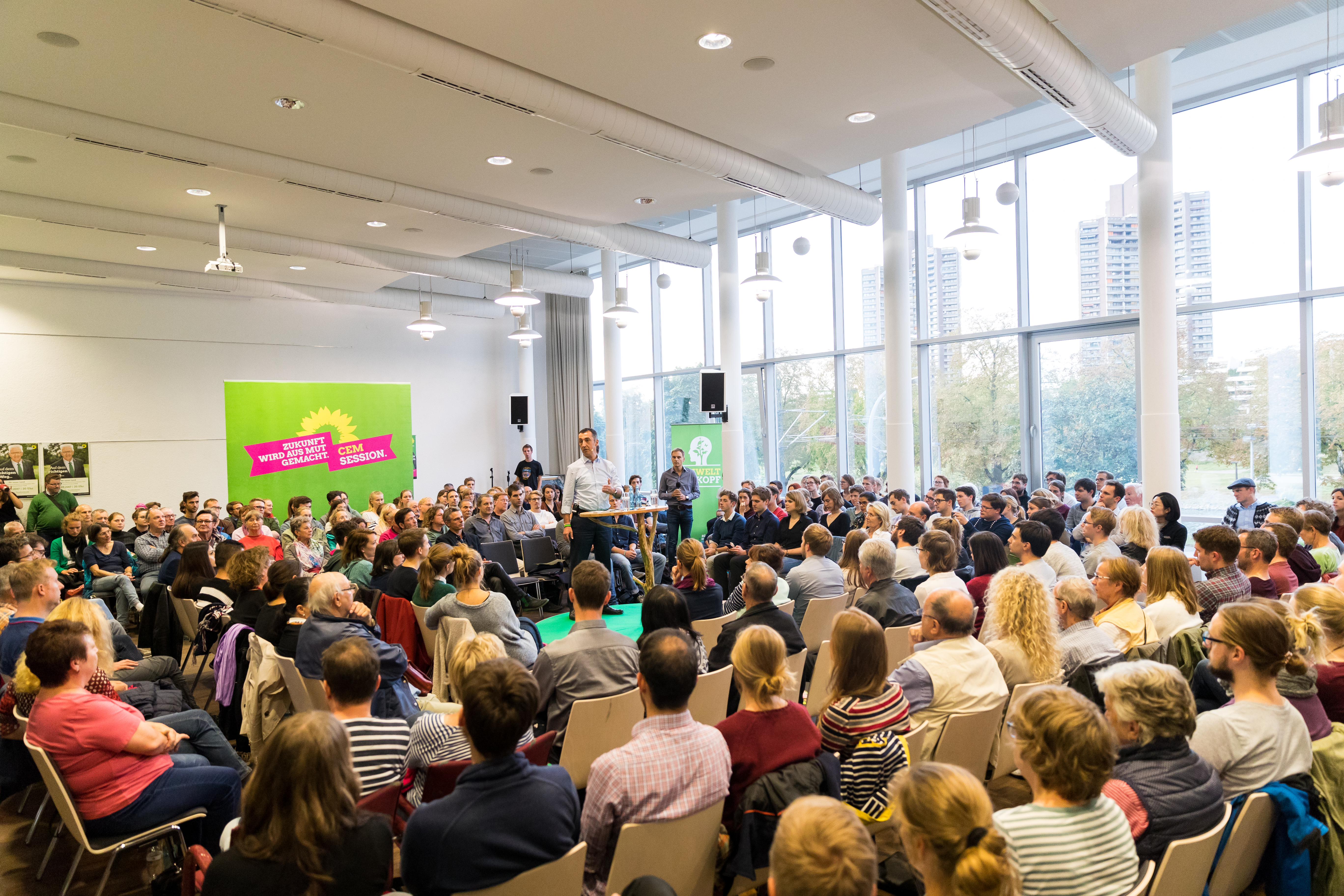 Cem Özdemir during Cem Session at Gewerkschaftshaus, Hans-Böckler-Str.1, Mannheim, Baden-Württemberg, Germany on 2017-09-12, Photo: Sven Mandel